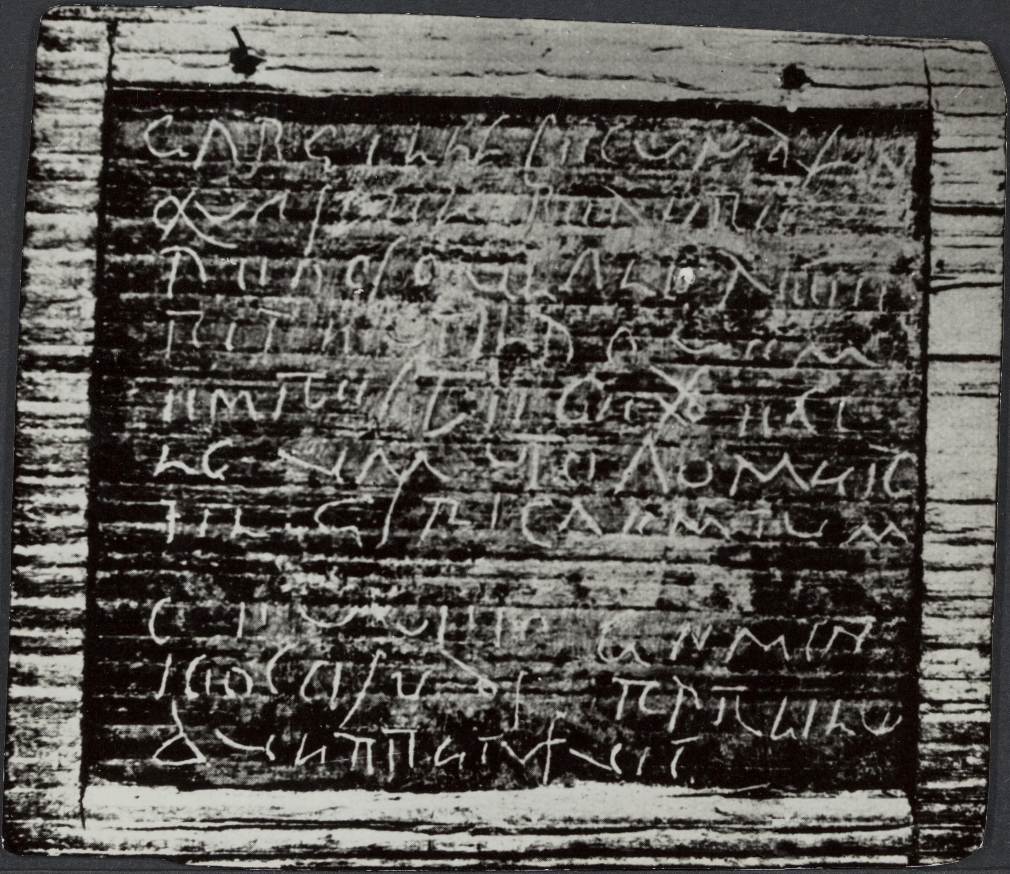 Romeins schrijfplankje met koopcontract van een koe gevonden in Tolsum. Eind 2007 hebben Fries Museum en Tresoar - Fries Historisch en Letterkundig Centrum de tekst op het schrijfplankje opnieuw laten onderzoeken aan de Universiteit van Oxford (prof. dr. A. Bowman en dr. R. Tomlin) en Universiteit Leiden (prof. dr. K.A. Worp). April van dit jaar hebben we de onderzoeksresultaten gepresenteerd via een perspresentatie en een internationaal wetenschappelijk symposium, en daarop volgend met een reizende tentoonstelling door Nederland. Het onderzoek wordt in november 2009 gepubliceerd in het gezaghebbende ‘Journal of Roman Studies’. Drs. E. kramer (conservator Fries Museum) en ikzelf (bibliothecaris Tresoar, Buma Bibliotheek) waren namens beide instituten hierbij betrokken. Het nieuwe onderzoek onthult een geheel nieuwe tekst op dit Romeinse schrijfplankje met exacte datering. Het betreft een schuldverklaring tussen een Romeinse slaaf Carus (of: Andecarus) en een onbekende schuldenaar. Het document is op 23 februari 29 n. Chr. opgesteld. Met deze datering herbergt het schrijfplankje uit Tolsum de oudst bewaard gebleven geschreven tekst van Nederland Fotograaf: Han de Vries, Fries Museum